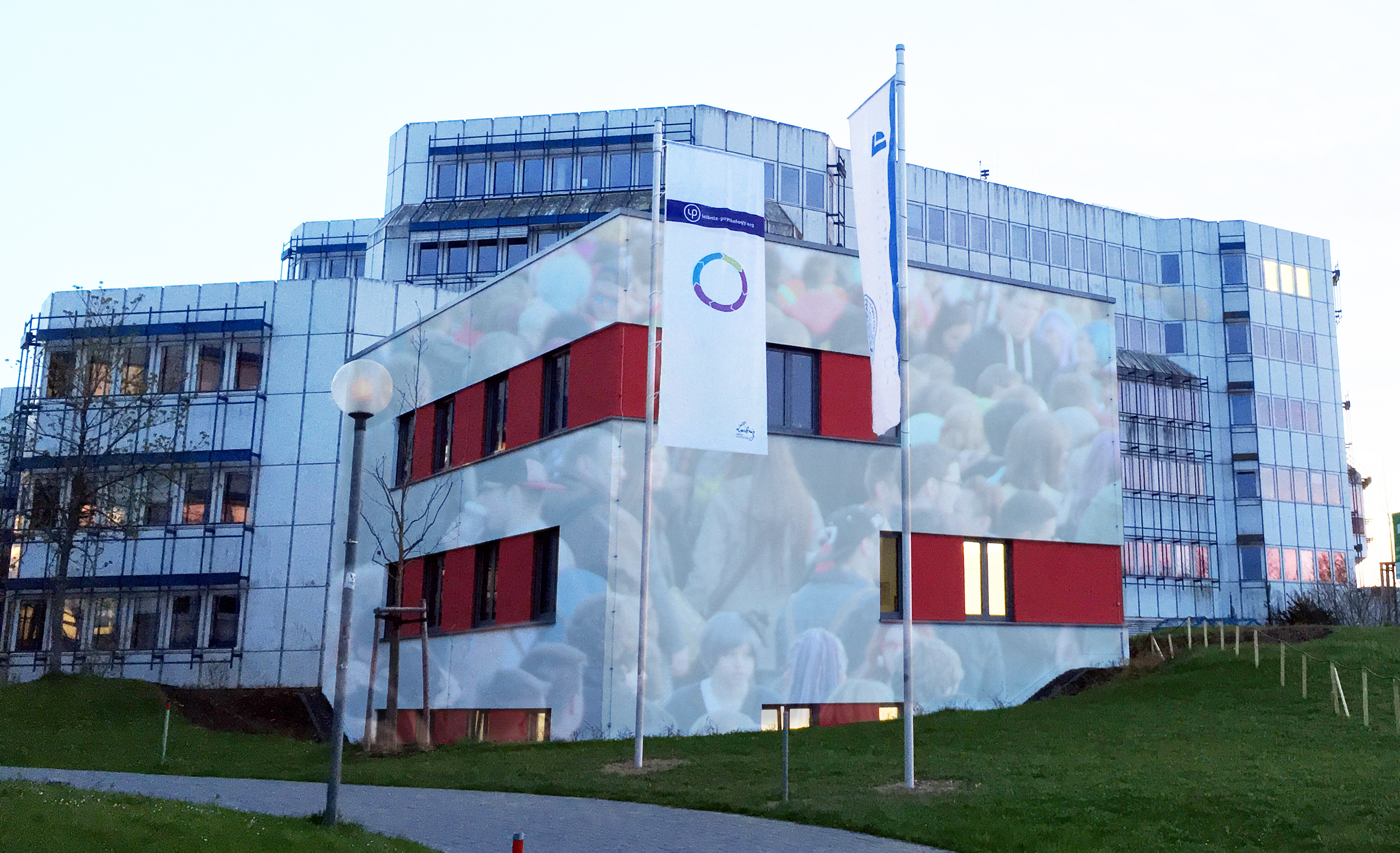 Das D-Gebäude sowie ein Anbau an der Universität Trier, in denen das ZPID hauptsächlich sitzt.